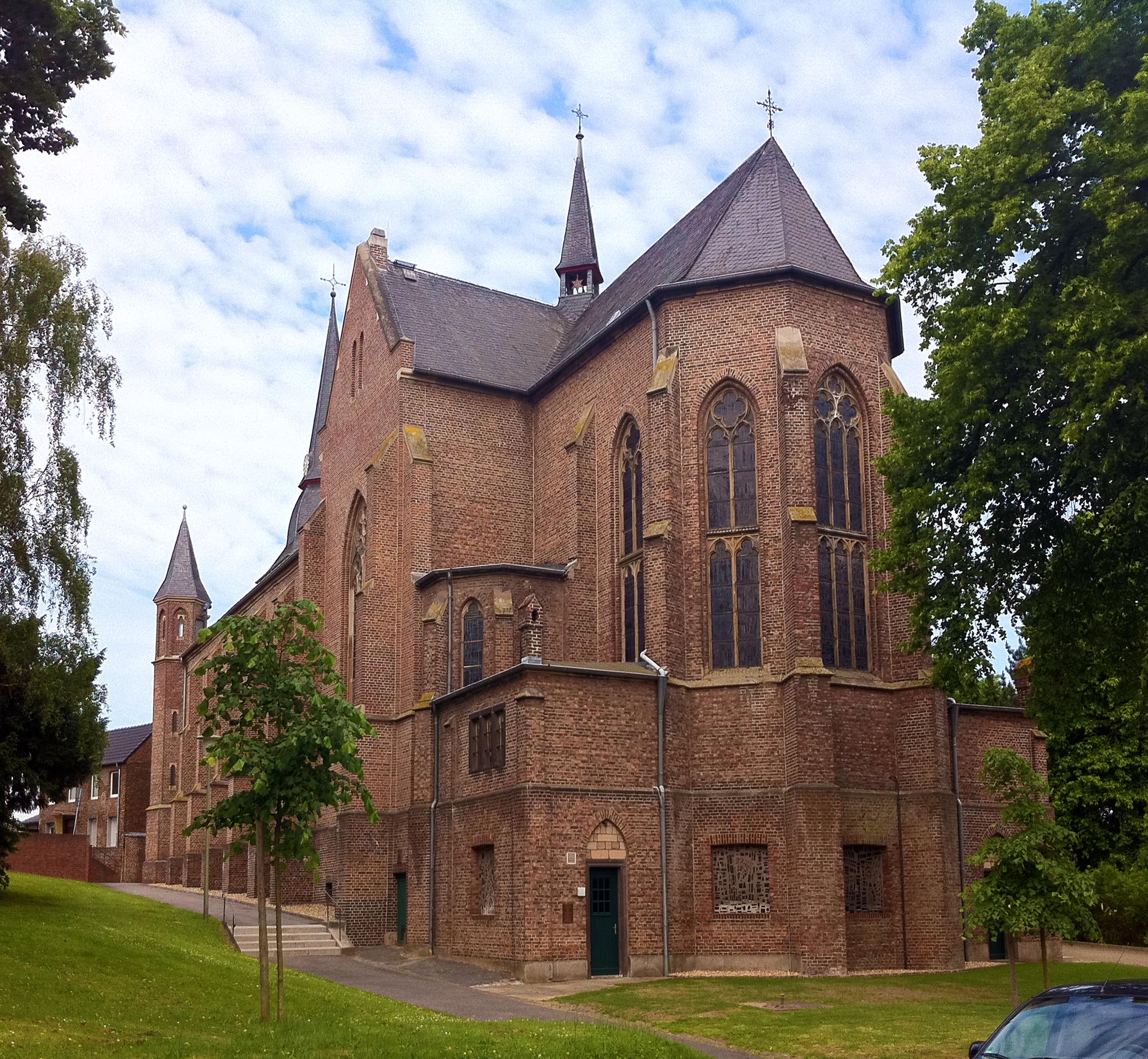 Lövenich, Kirche St. Petri Bekehrung